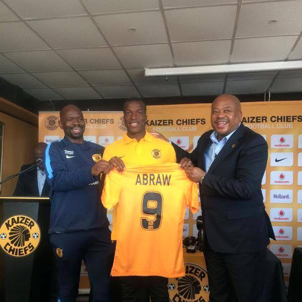 CAmal Abraw en Afrique du Sud, saison 2015